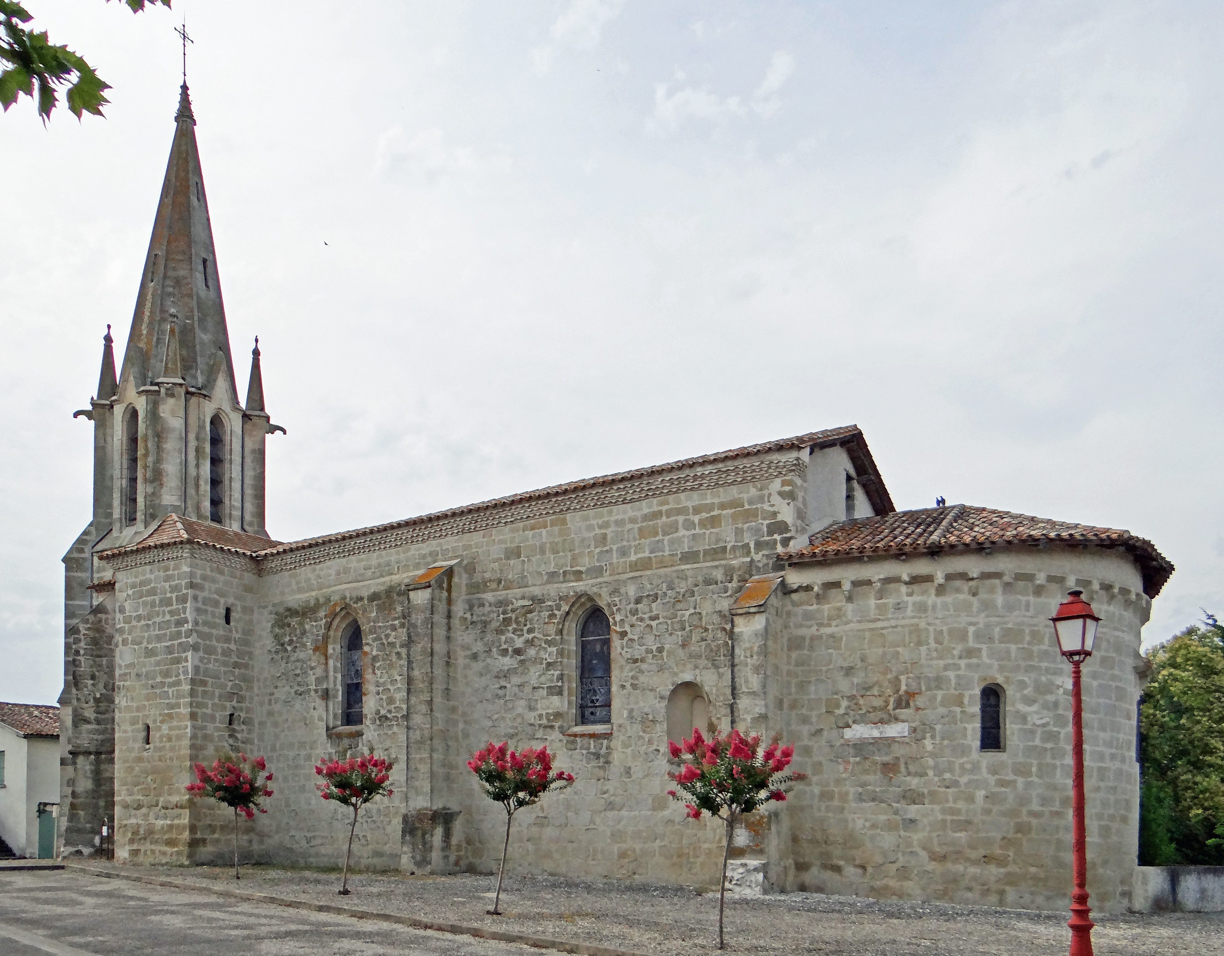 Bourgougnague - Église Notre-Dame, vue du chevet